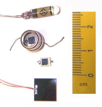 versch Si-Fotodioden, oben eine Ge-Fotodiode